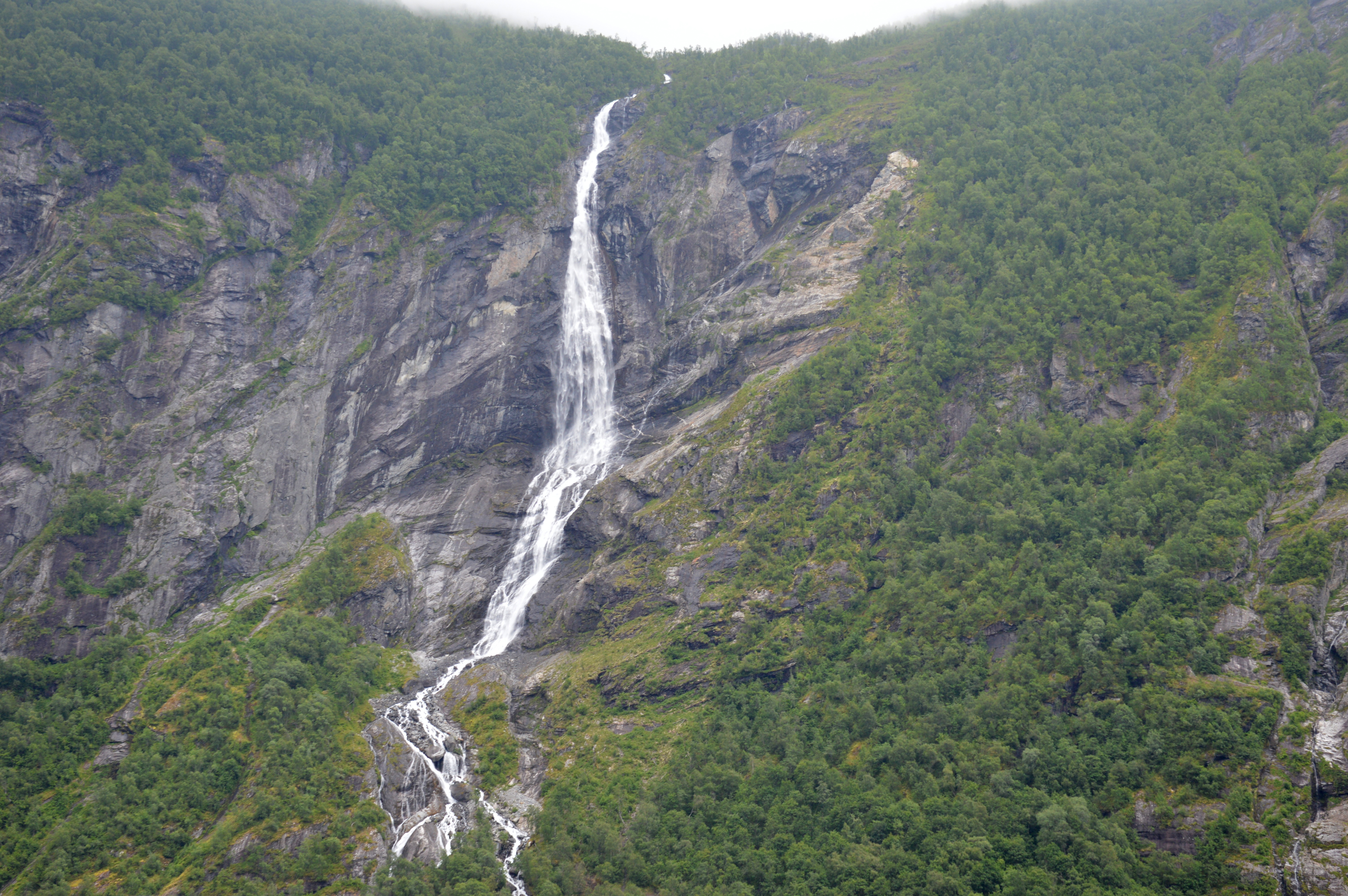 Ljosurfossen im Geirangefjord